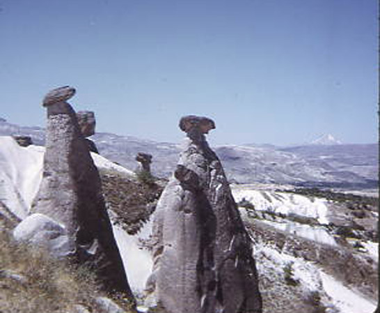 Cheminées de fées, dans du tuf volcanique. Turquie, Anatolie, région de Nevsheir.